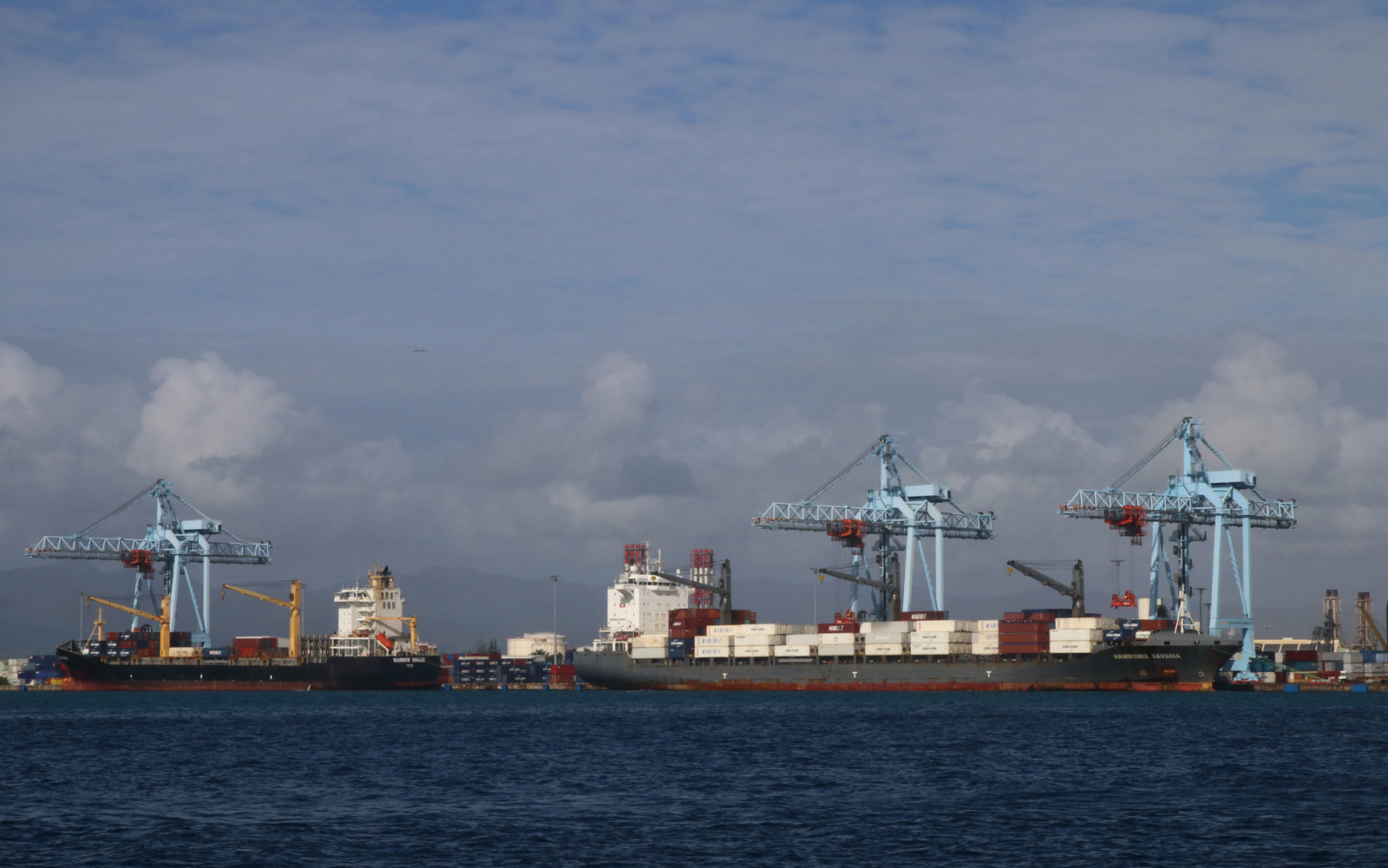 Port de Jarry à Pointe-à-Pitre